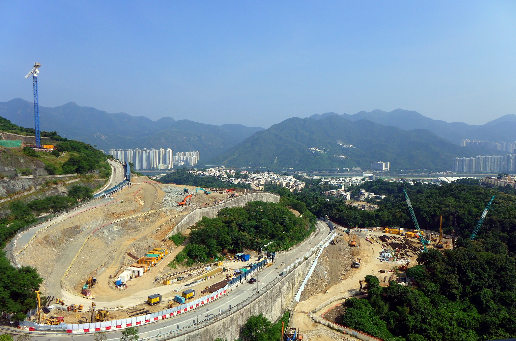 Kau To Shan